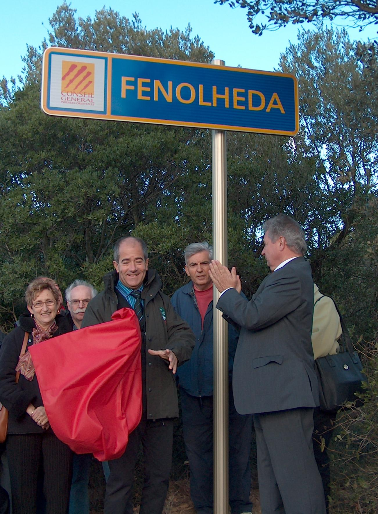 Inauguration d'un panneau de signalisation en occitan, dans les Fenouilledes.